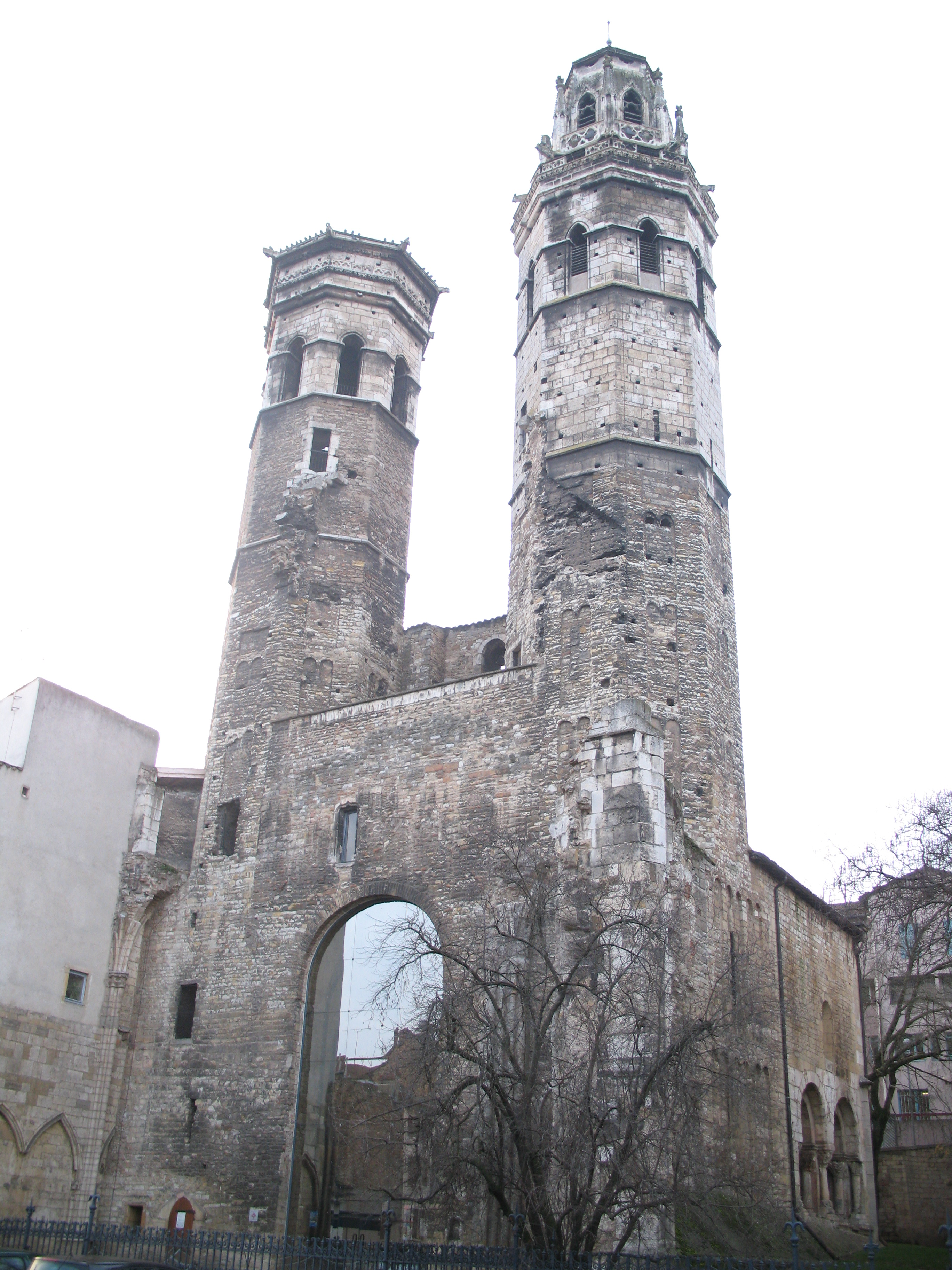 cathédrale du Vieux Saint-Vincent - Mâcon (Saône-et-Loire)